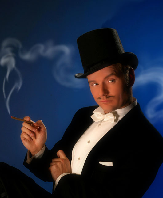 Estonian actor Mart Sander